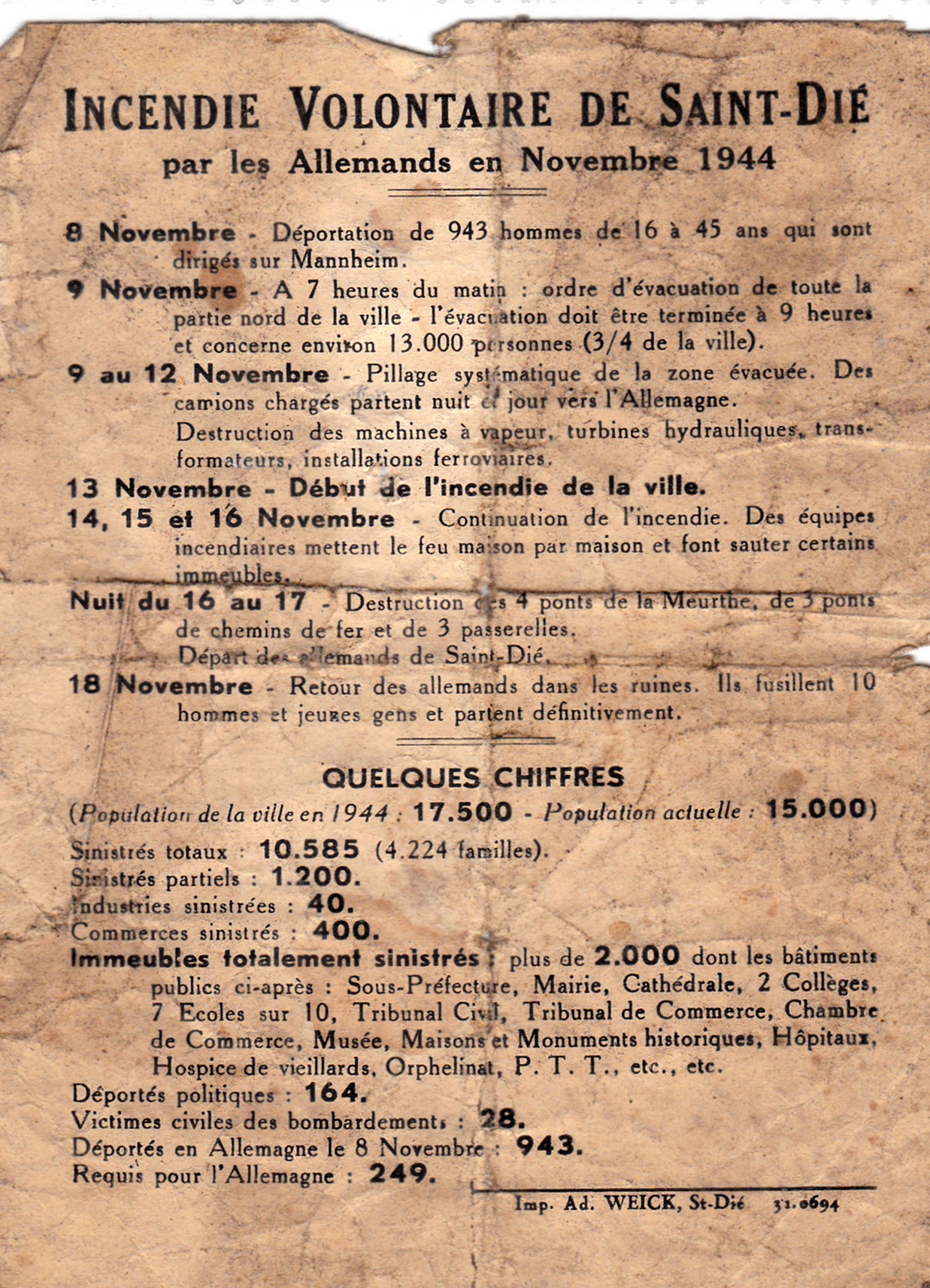 Reproduction d'un document trouvé dans les archives de feu mon oncle Gaston Richardot, scanné par mes soins